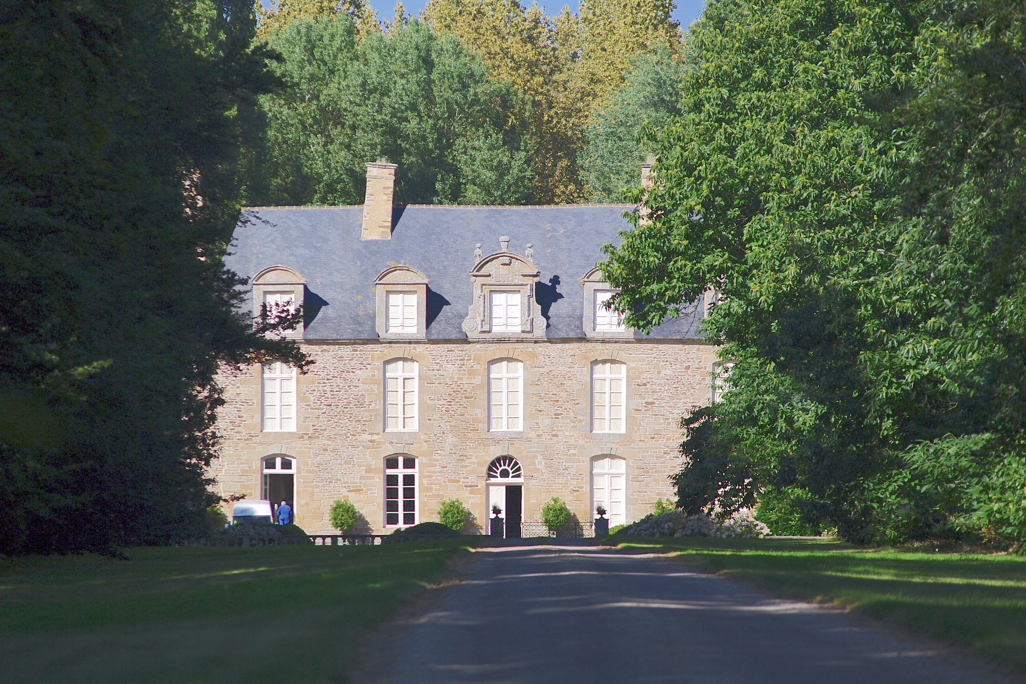 Manoir de la Chesnaye-Taniot, à Matignon (Côtes-d'Armor, France)